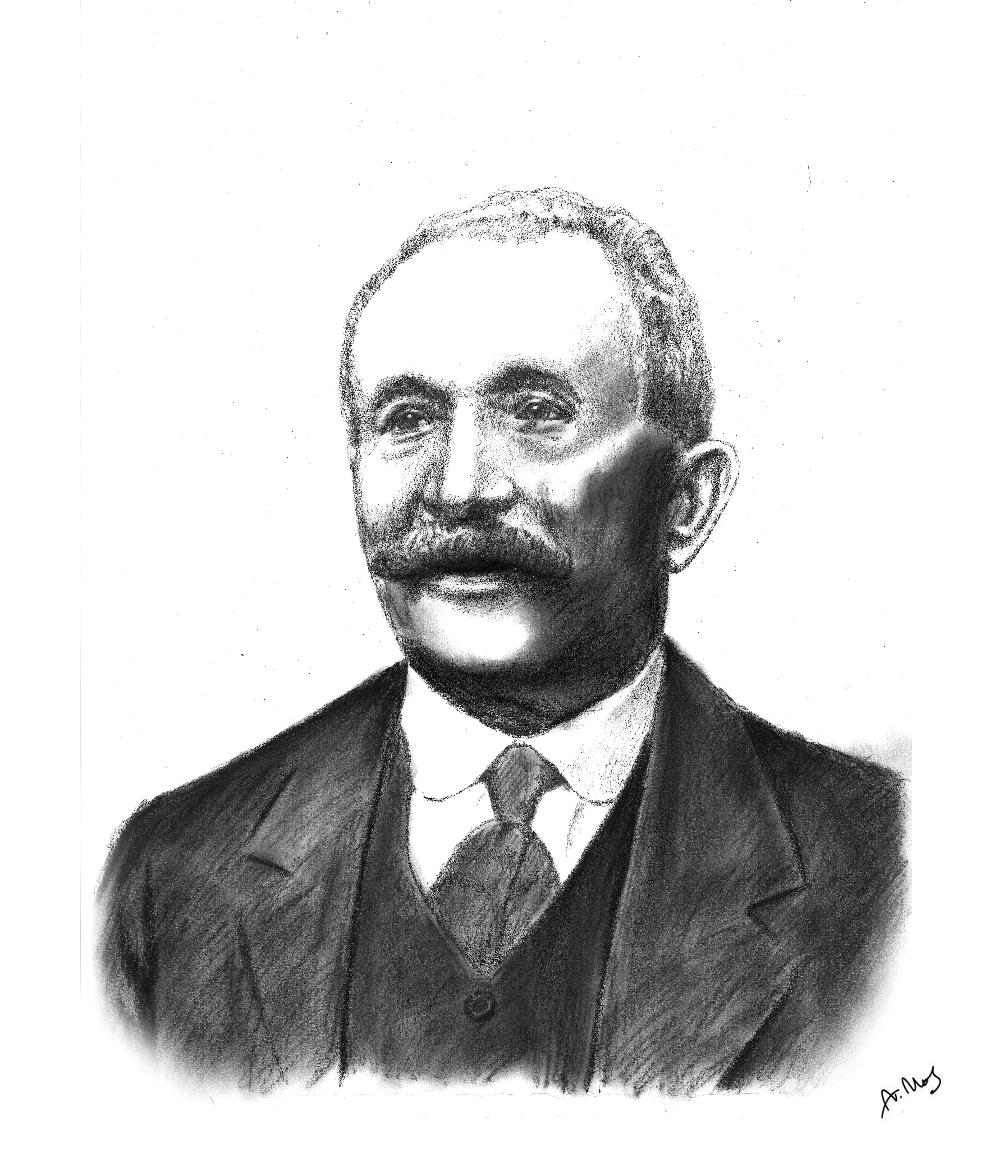 Retrat de Rosendo Julià Palahí (dibuix d'Andreu Mas)